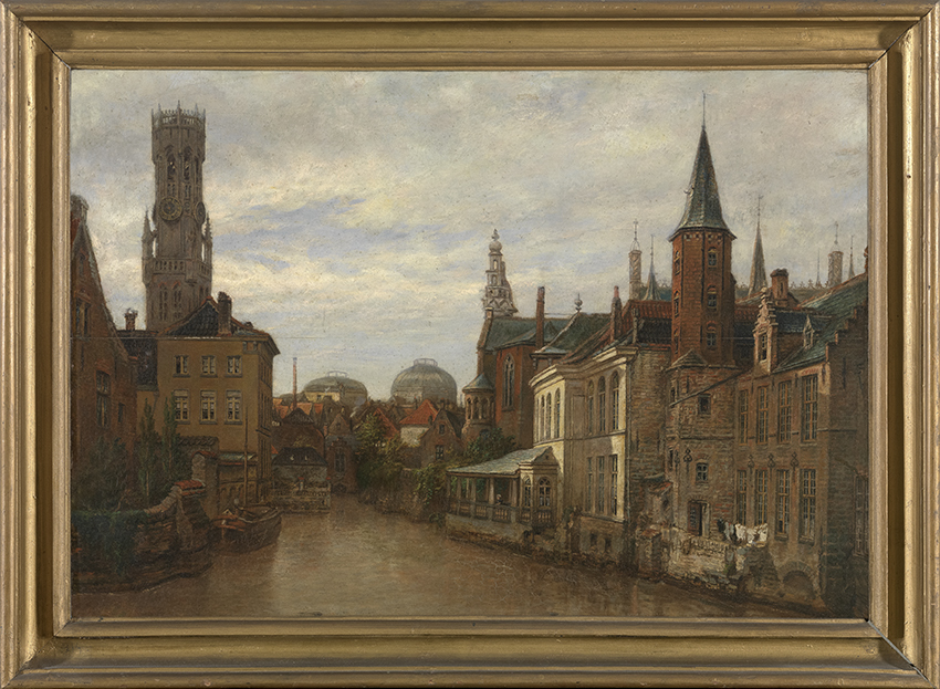 De Rozenhoedkaai in Brugge (Antoon L. Joostens, circa 1875); collection: Musea Brugge - Groeningemuseum